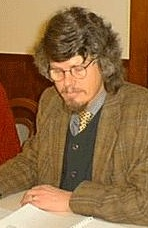 Jörg Schulz, Geschäftsführer der Deutschen Schachjugend, Jugendversammlung 2001 in Münster.